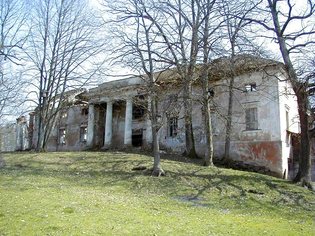 Kāda no Mārcienas muižas ēkām 2000-04-21